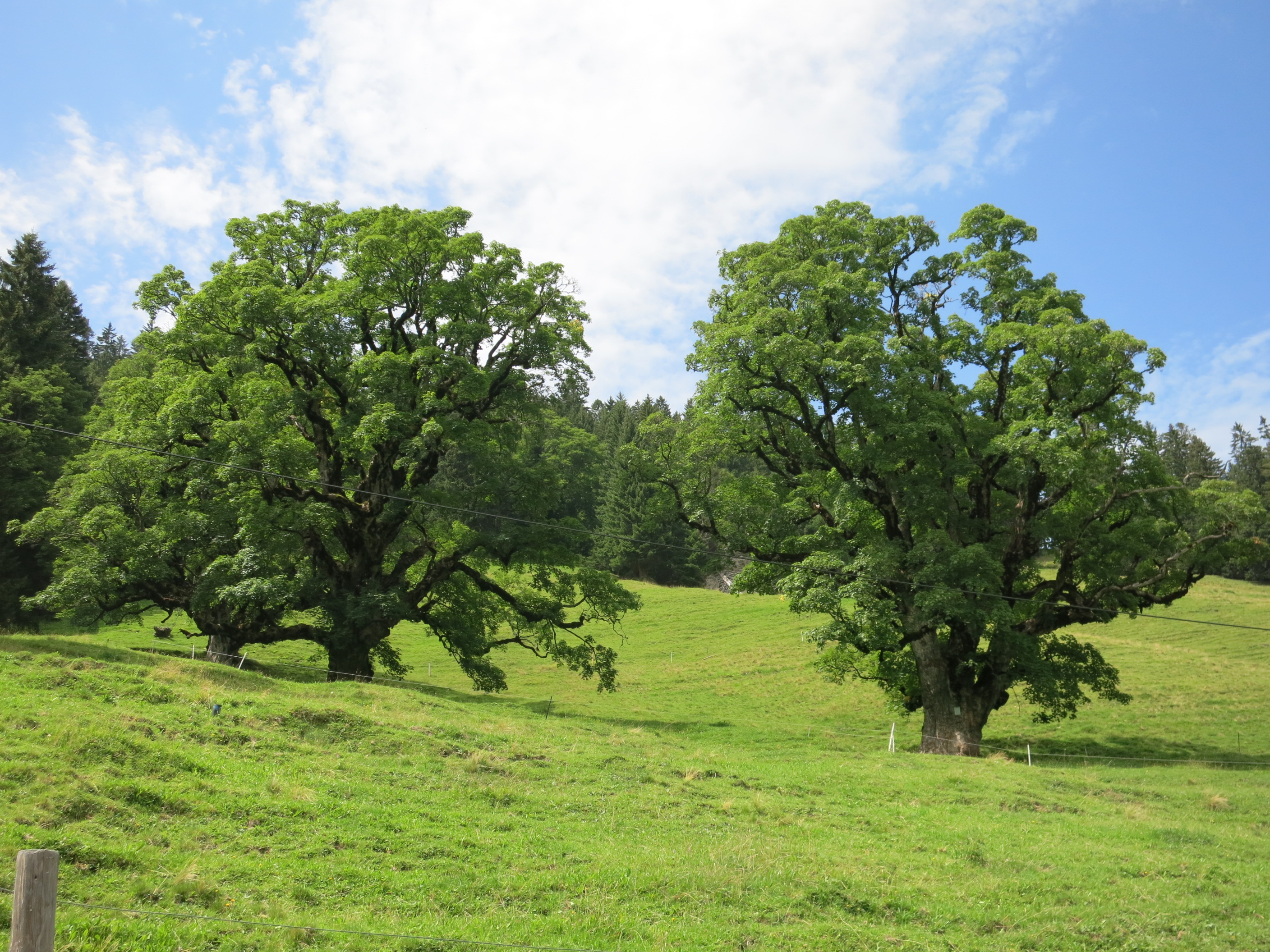 Bergahorn Valzeina GR, Schweiz